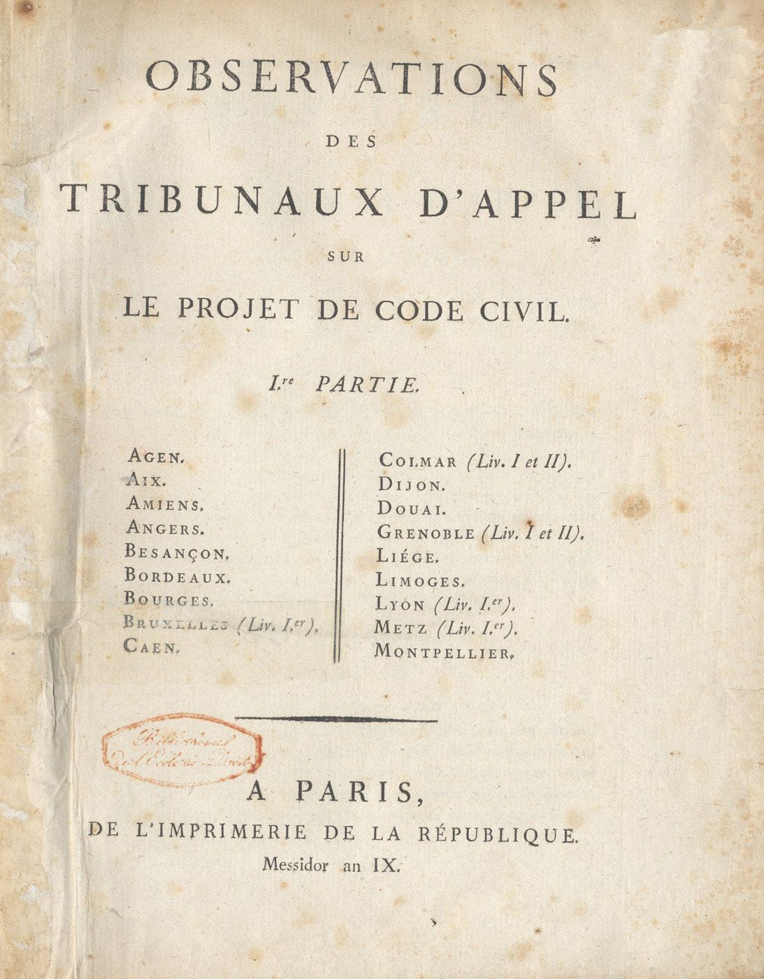 Observations des Tribunaux d'Appel sur le projet de Code civil